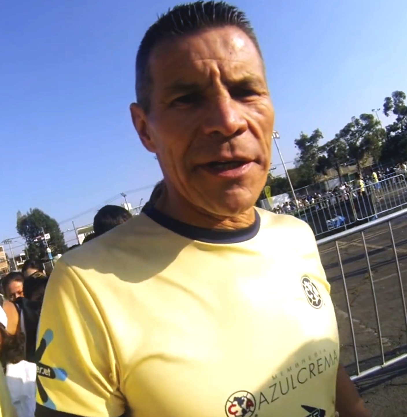 Alfredo Tena en 2016.